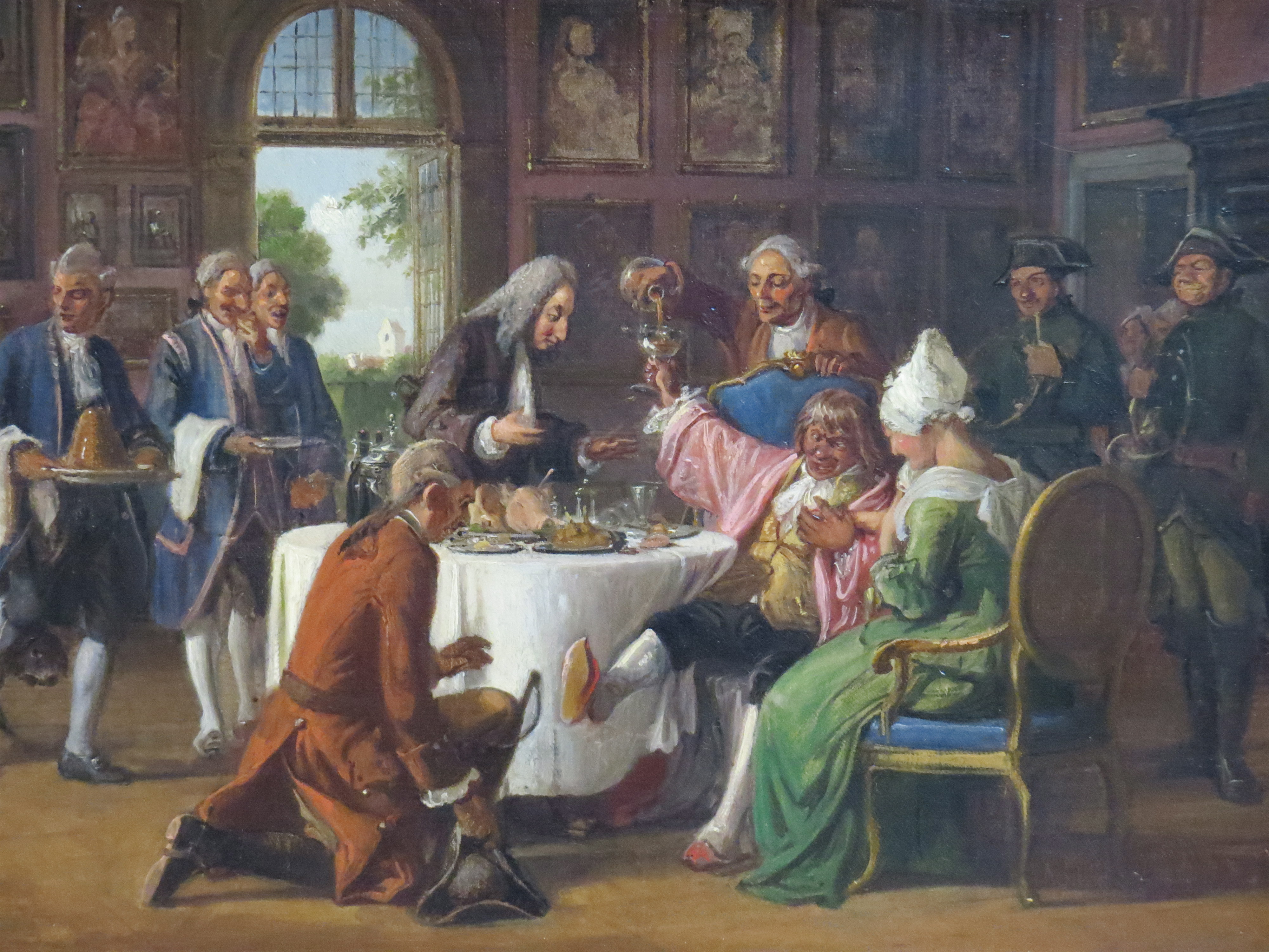 Scene fra Holbergs Jeppe på bjerget, Wilhelm Marstrand (1810-1873), Den Hirschsprungske Samling, København